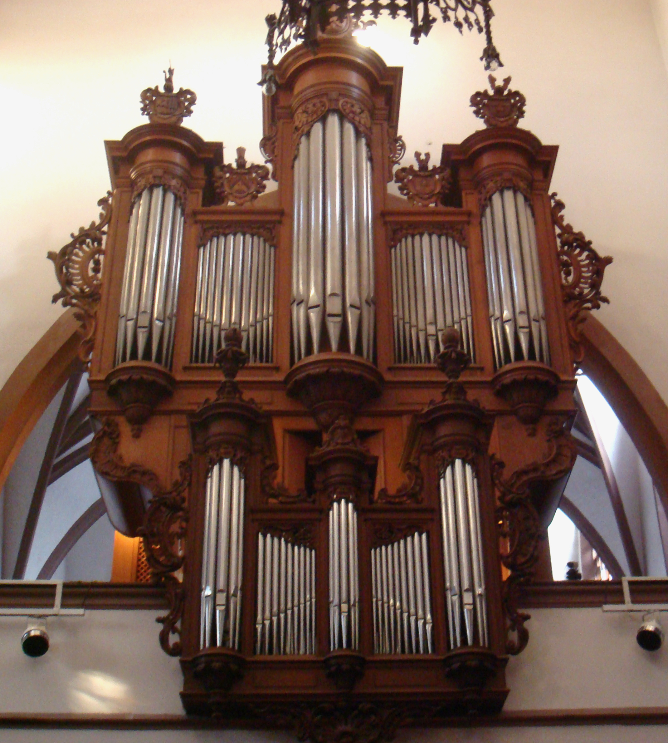 Orgel der Peterskirche in Basel; Gehäuse von Johann Andreas Silbermann, 1770 für die Theodorskirche; Werk 1968 von Neidhart & Lhôte.